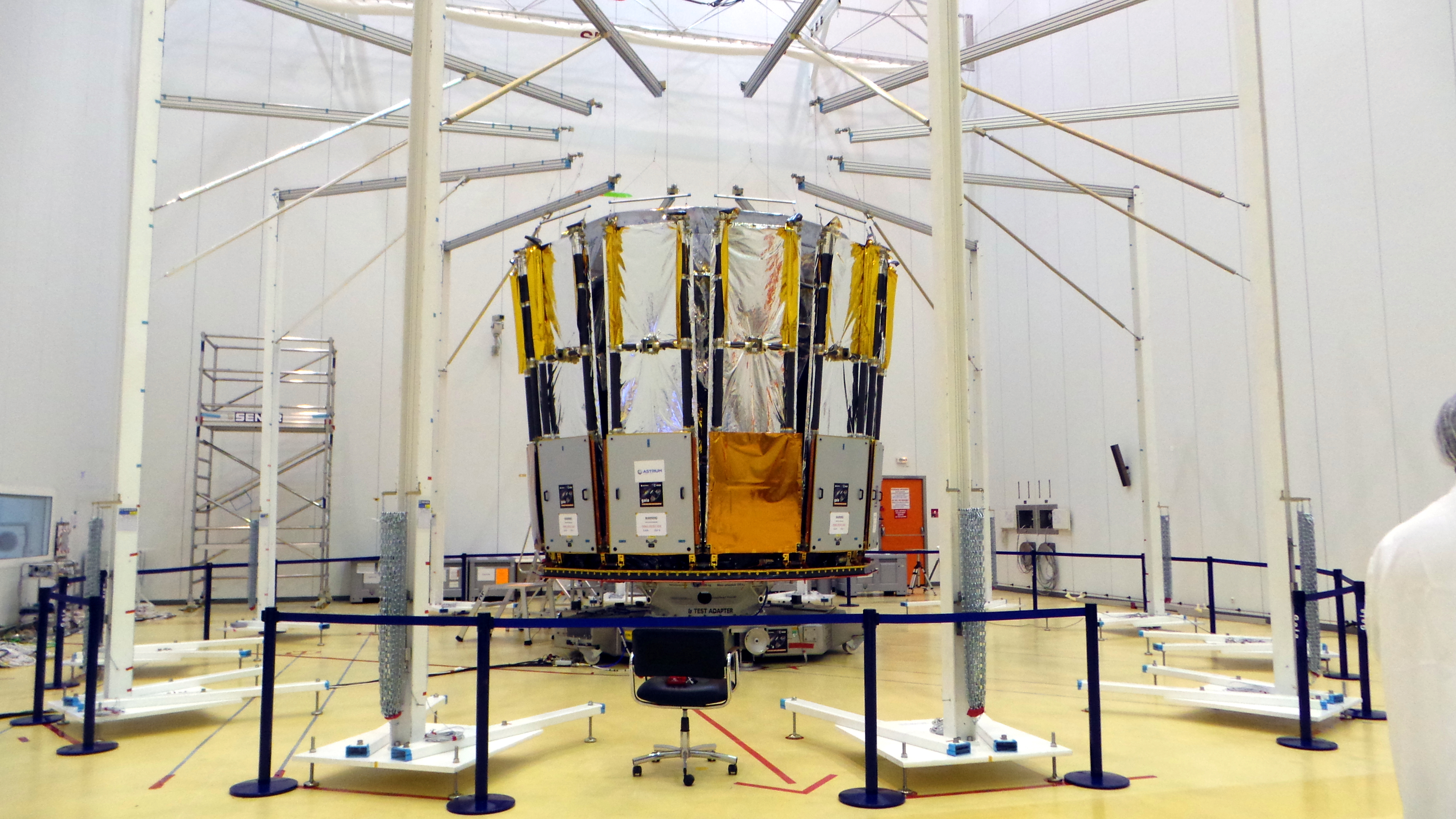 Imagenes de la fase final de construcción de la sonda espacial en el laboratorio de la Agencia Espacial Europea en la Guayana Francesa a pocas semanas de su lanzamiento